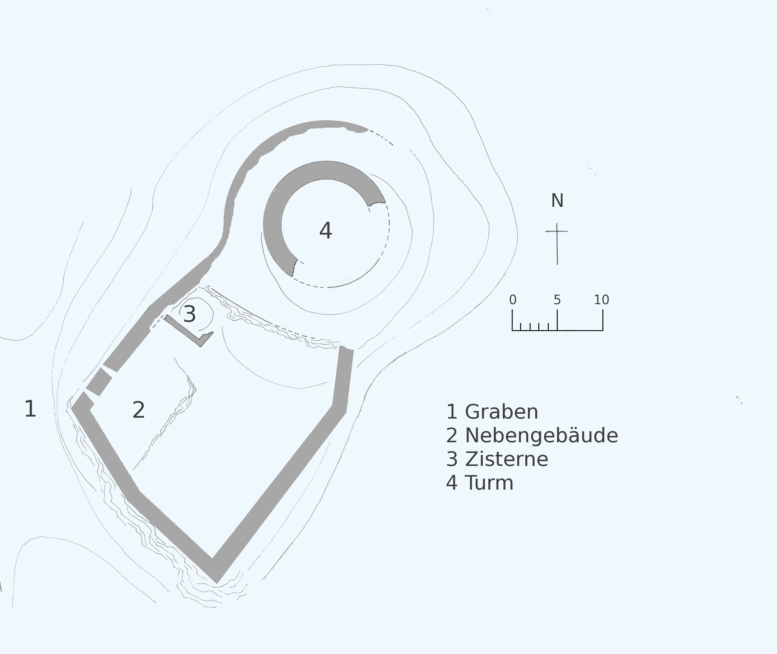 Übersichtsplan